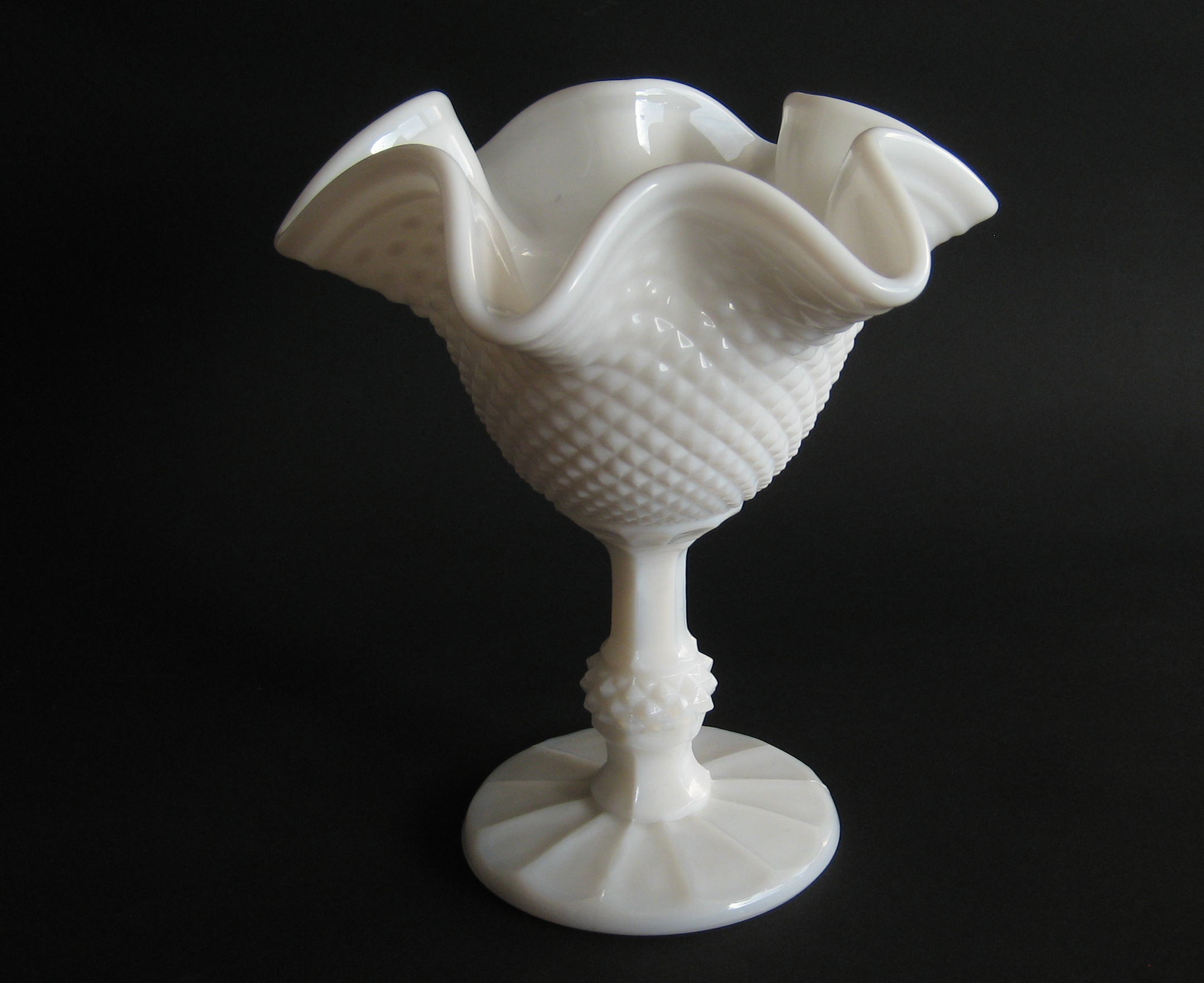 Pedestal milk glass bowl